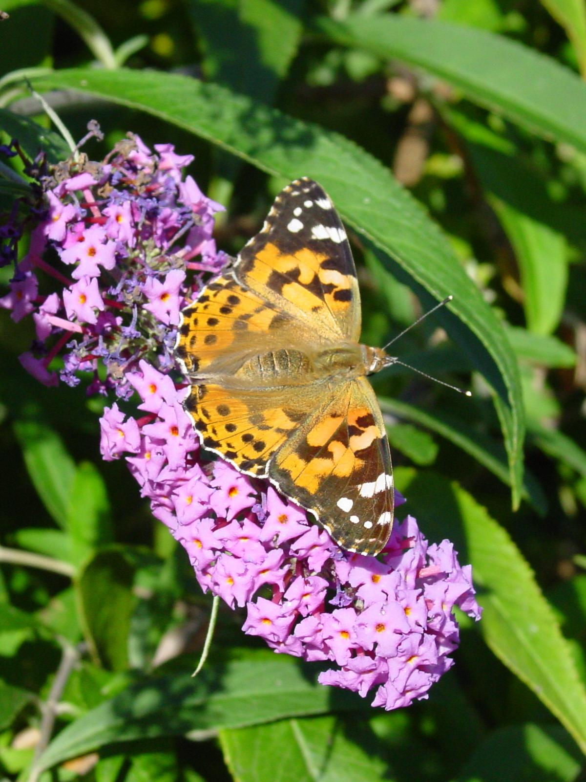 self made. Bastabales - Galicia - Spain Species: Vanessa cardui